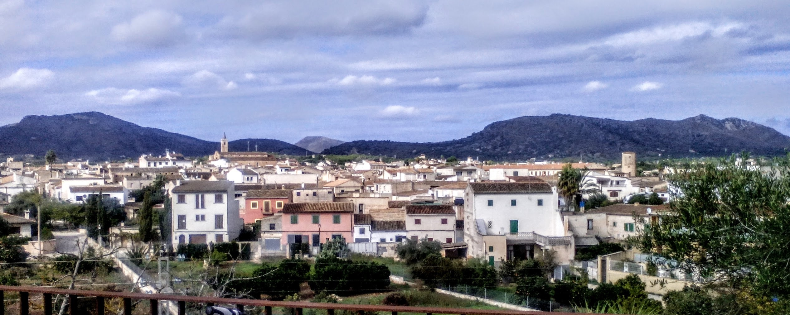 imagenes sant llorenç des cardassar 21 de octubre 2016